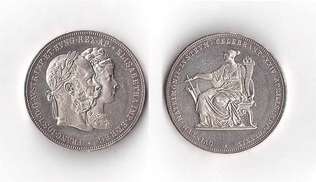 Medaglia commemorativa del XXV anniversario di nozze dell'imperatore d'Austria Francesco Giuseppe I e Elisabetta di Baviera più conosciuta come "Sissi".